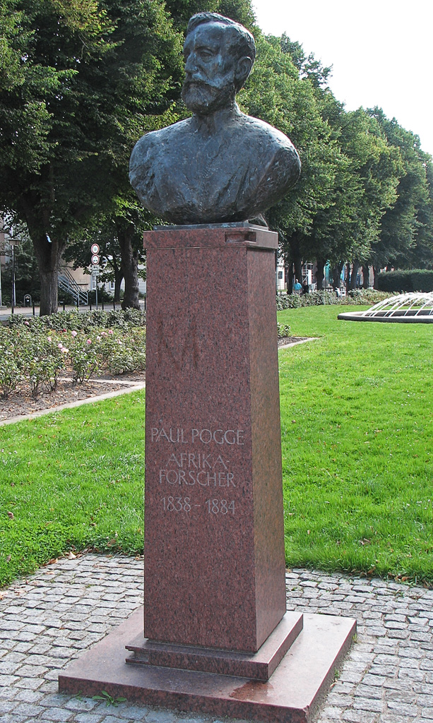 Paul Pogge-Denkmal im Rosengarten in Rostock / Deutschland.